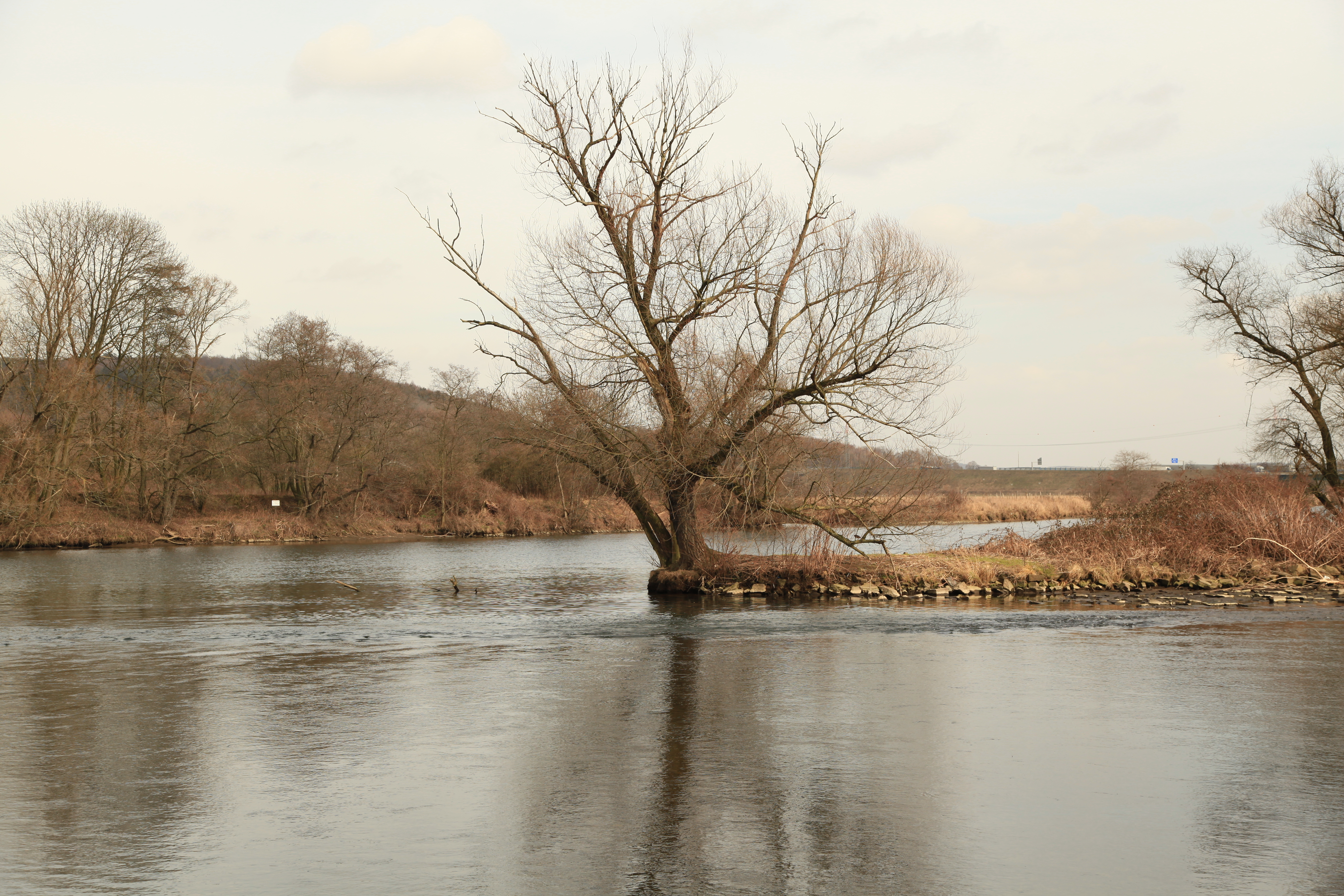 Mündung der Lenne (vorne/rechts) in die Ruhr (hinten/links), Hohensyburgstraße in Hagen-Kabel; abgebildeter Bereich weitgehend im LSG „Lennehofsweide“ gelegen